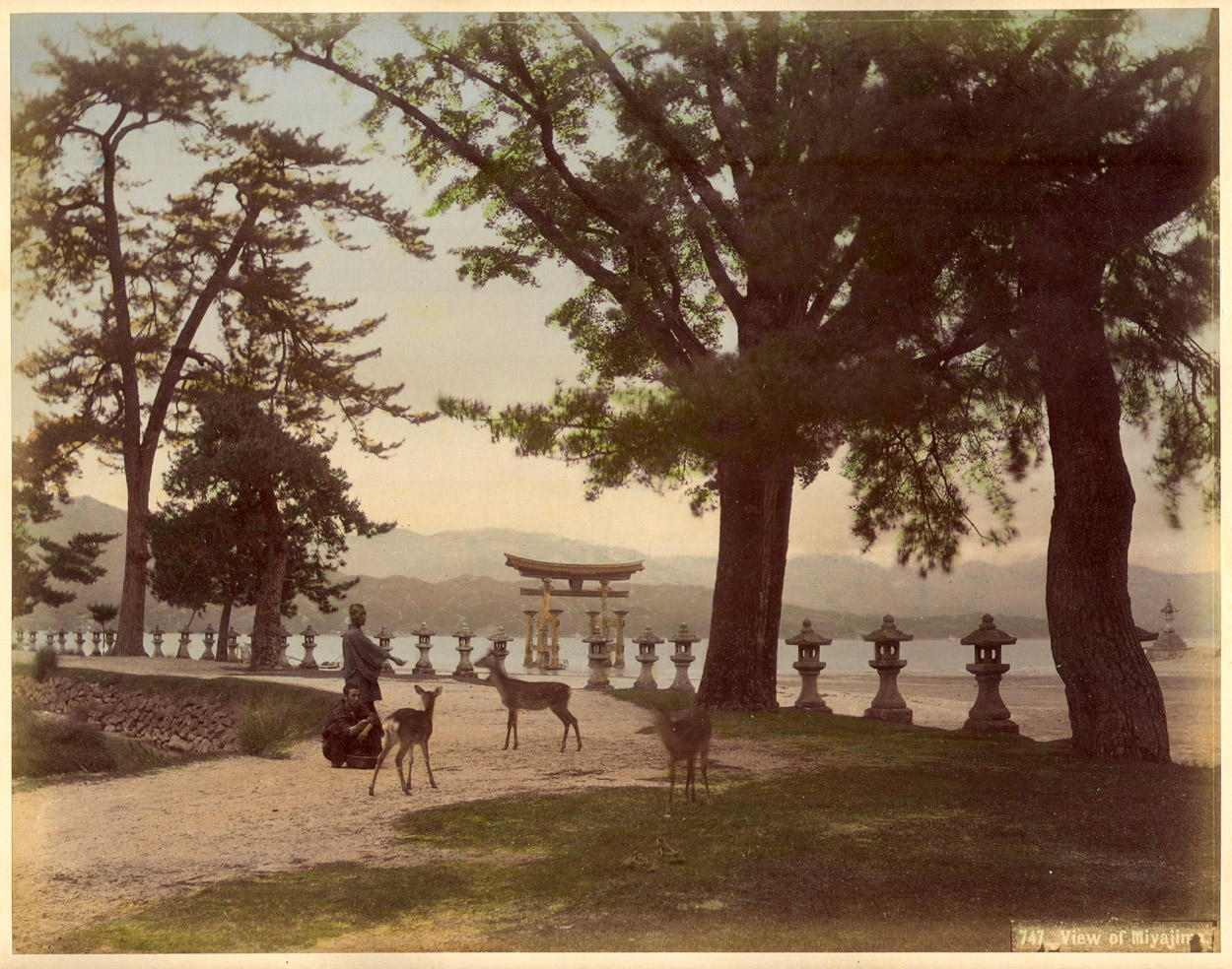 安芸の宮島。鹿島清兵衛撮影。1890年代。